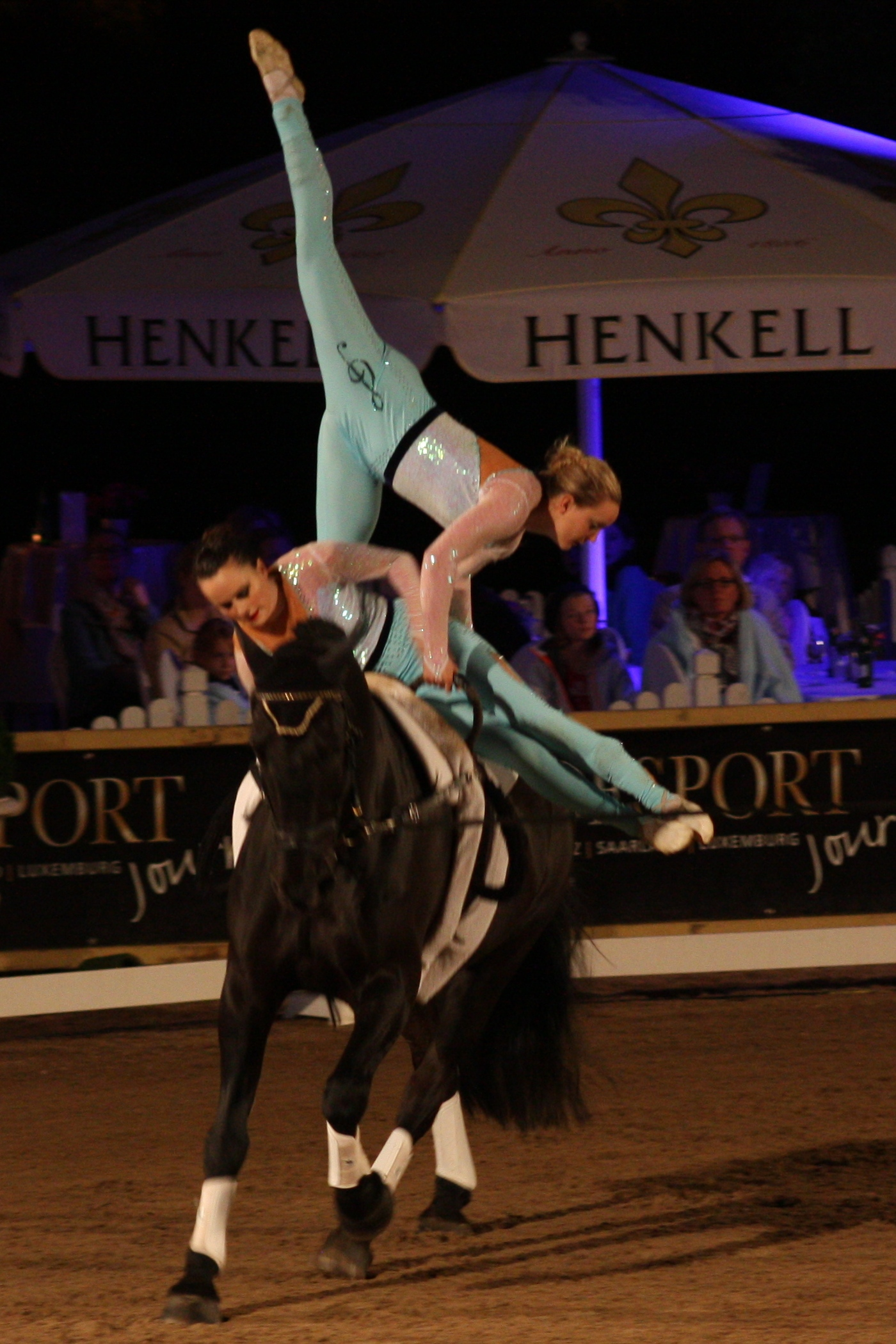 77. Internationales Pfingstturnier Wiesbaden 2013, CVI *** Voltigieren, Joanne und Hannah Eccles mit WH Bentley Personality rights warning Although this work is freely licensed or in the public domain, the person(s) shown may have rights that legally restrict certain re-uses unless those depicted consent to such uses. In these cases, a model release or other evidence of consent could protect you from infringement claims.